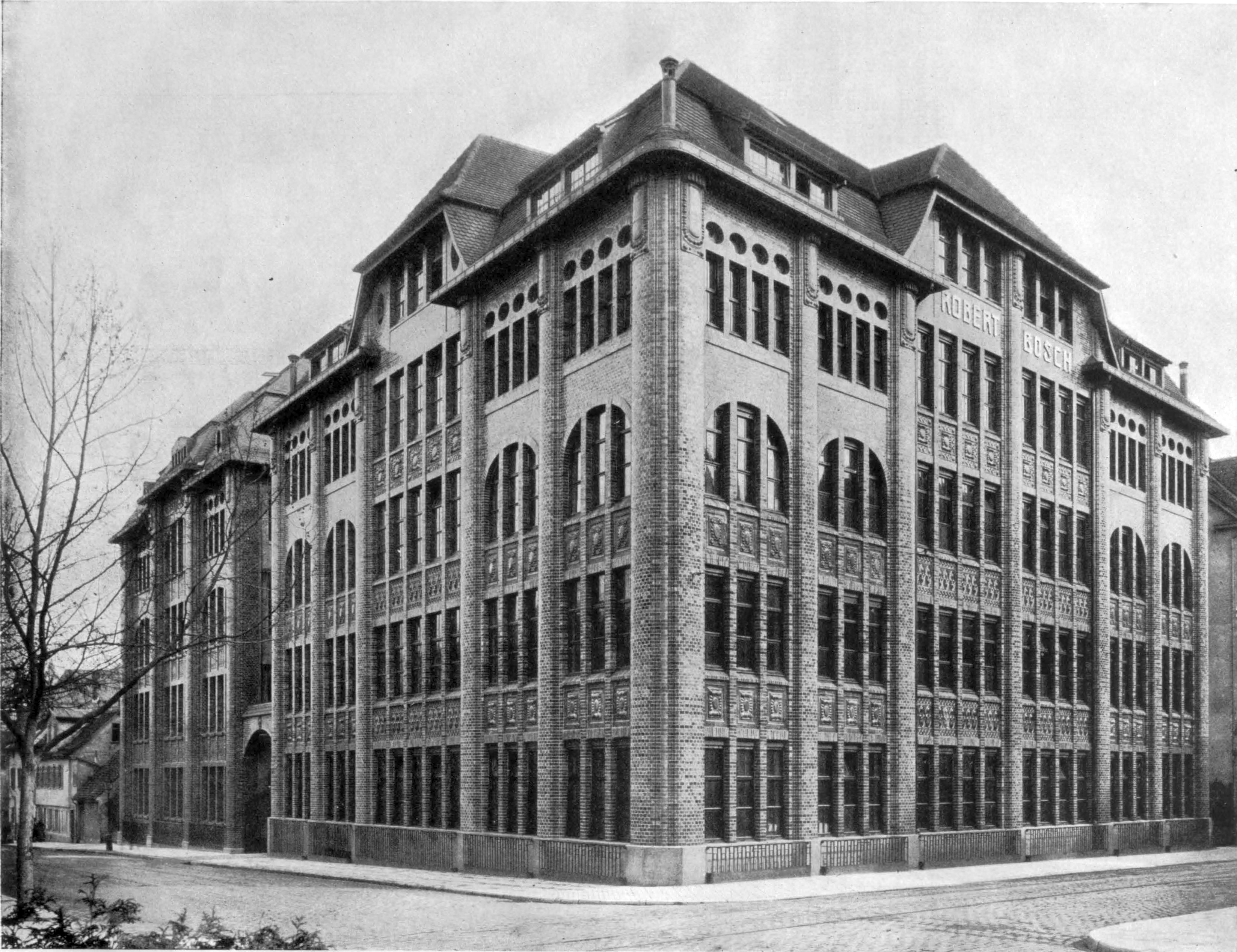 Ehemalige Fabrikbauten von Bosch in Stuttgart. Links hinten: Forststraße 7, Eckbau vorn: Forststraße 9 / Ecke Seidenstraße, Baujahr 1909.